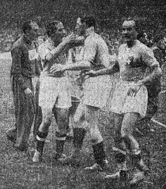 Victoire de l'Italie en finale de Coupe du monde de football 1938, Giuseppe Meazza congratule Silvio Piola.